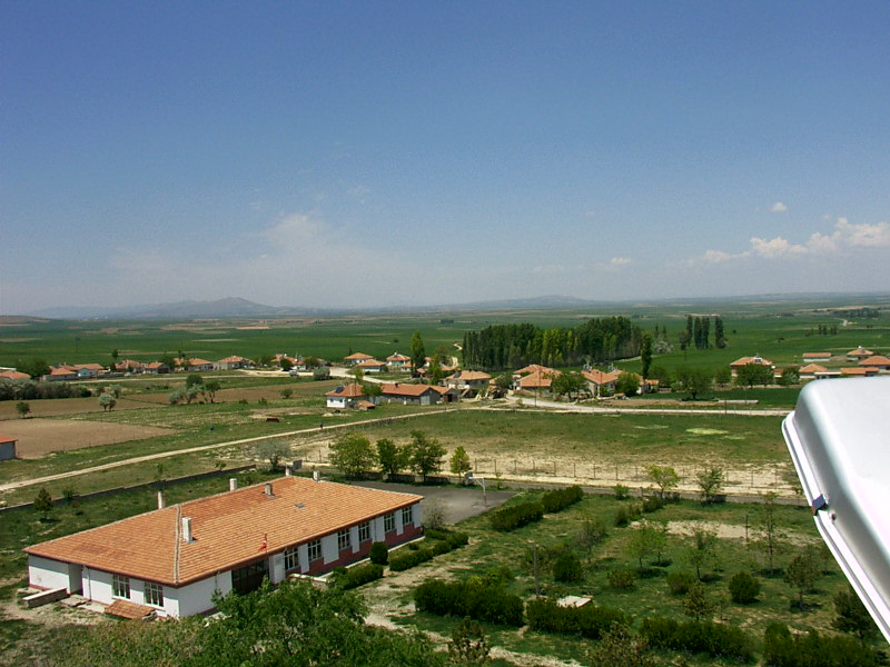 Köşektaş köyü Hacıbektaş, Nevşehir